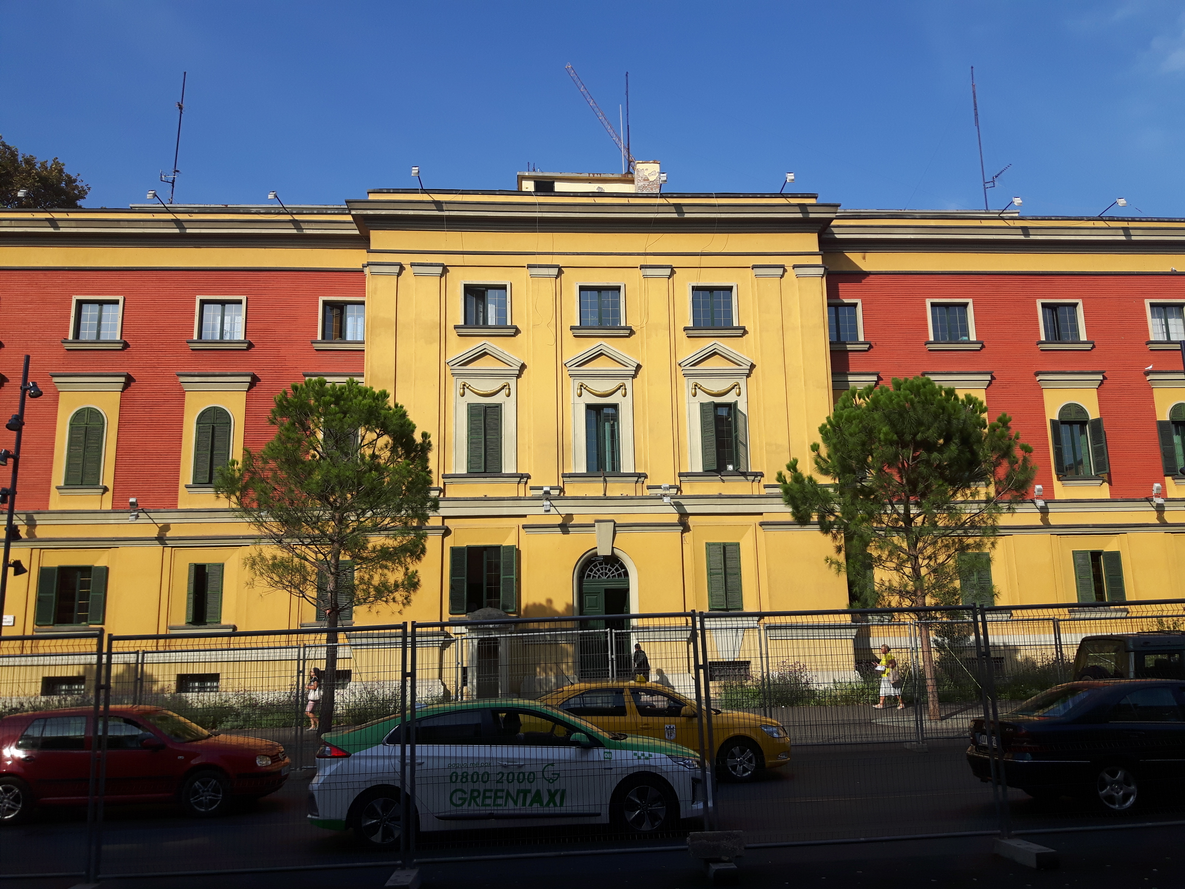 Ministria Financave (Tiranë)